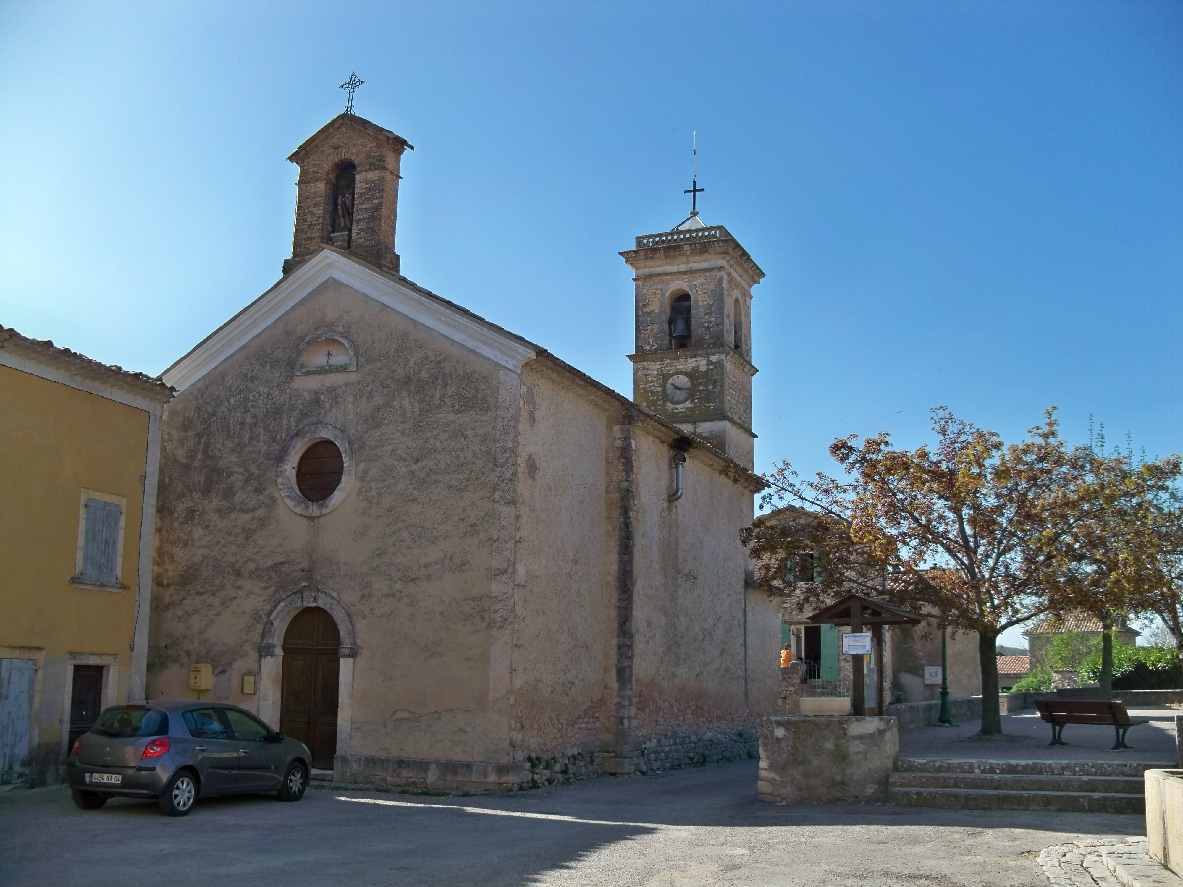 église de Montsalier (04)